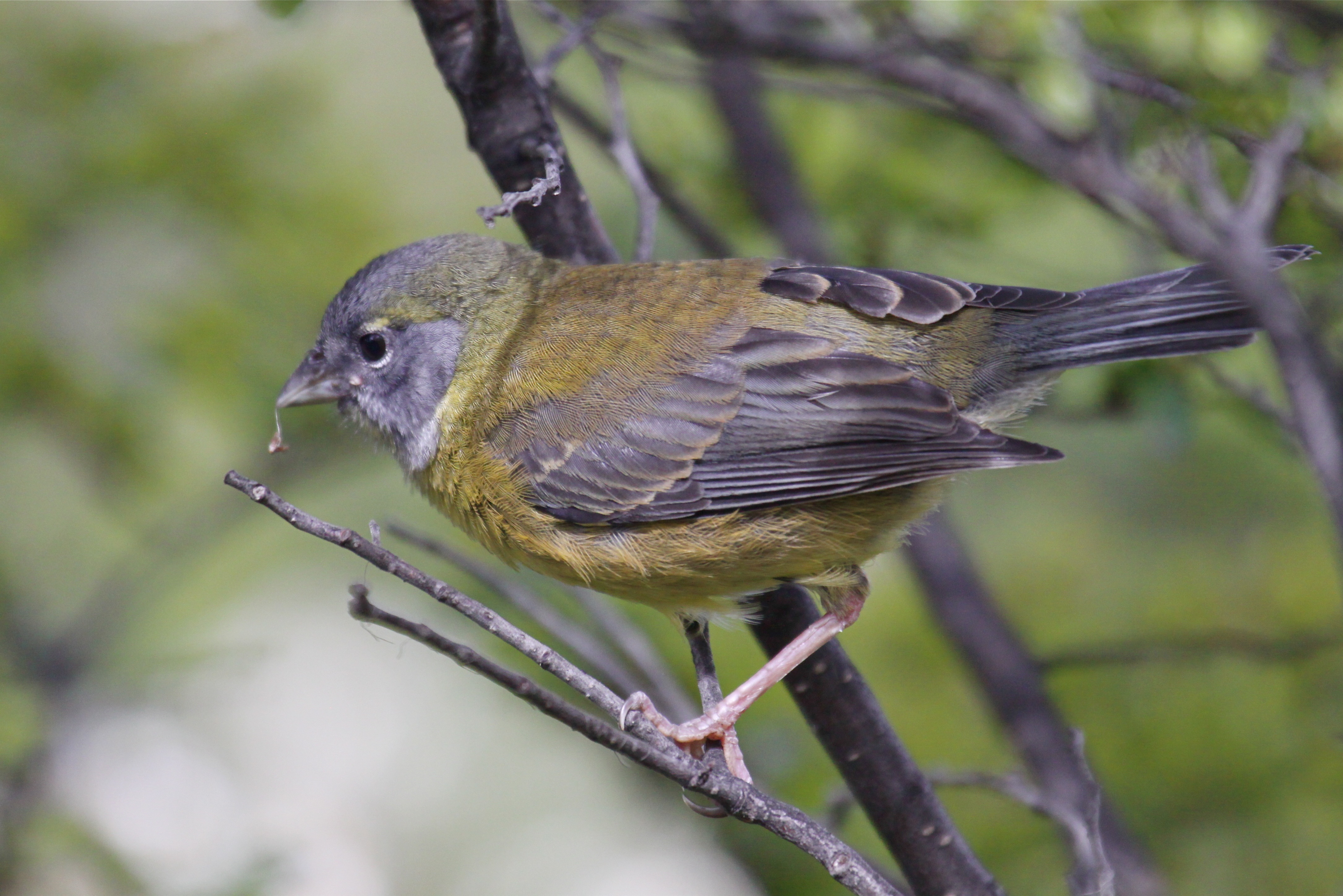 Tierra del Fuego National Park